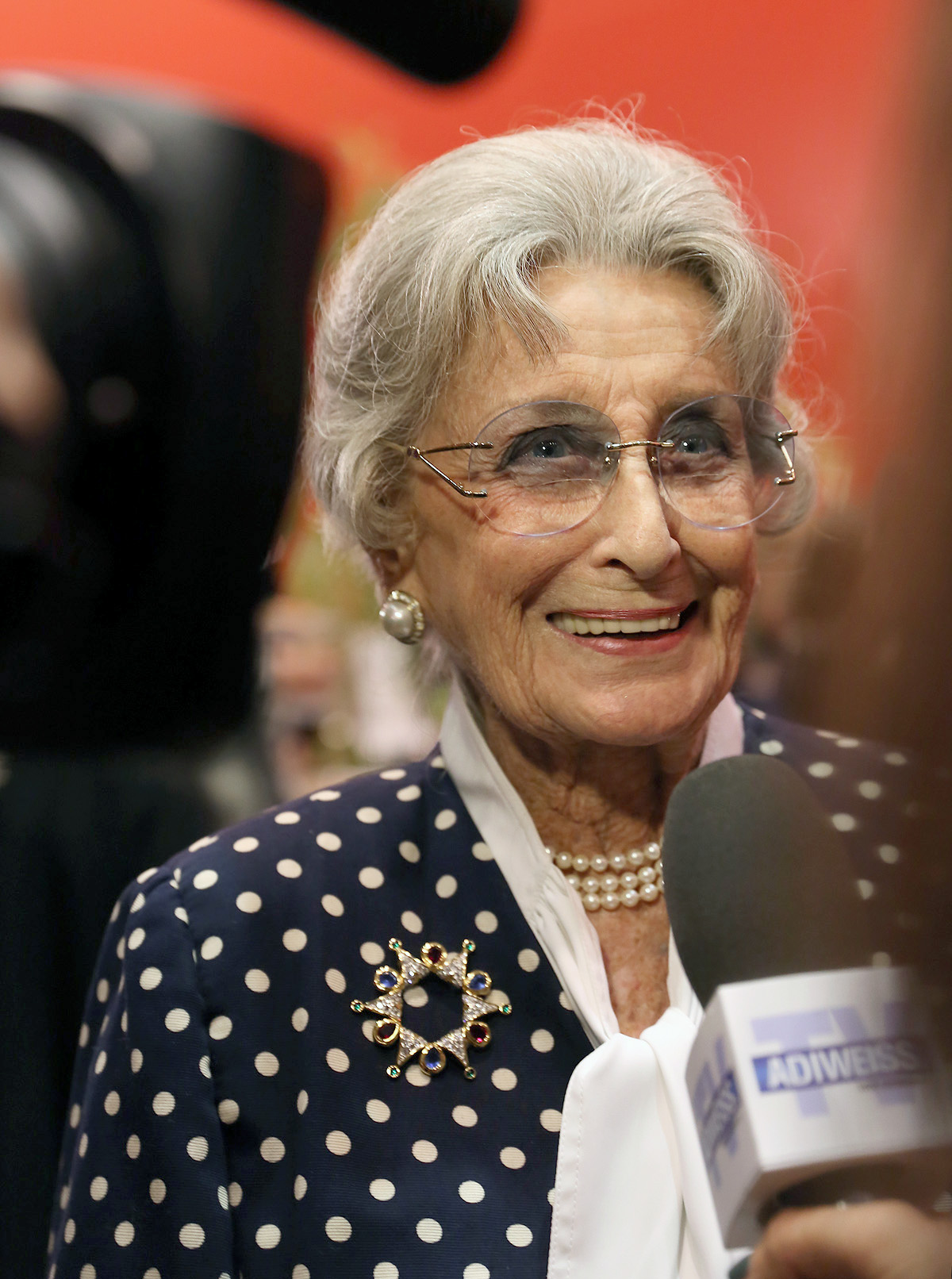 Lotte Tobisch - Nestroy-Theaterpreis 2013 in der Halle F der Wiener Stadthalle (Wien, Österreich).